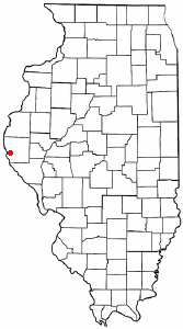 Volapük: Topam in tat: Illinois.